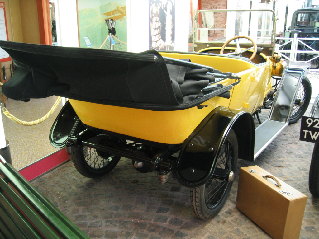 Peugeot Type 159 - Musée Peugeot Sochaux other version